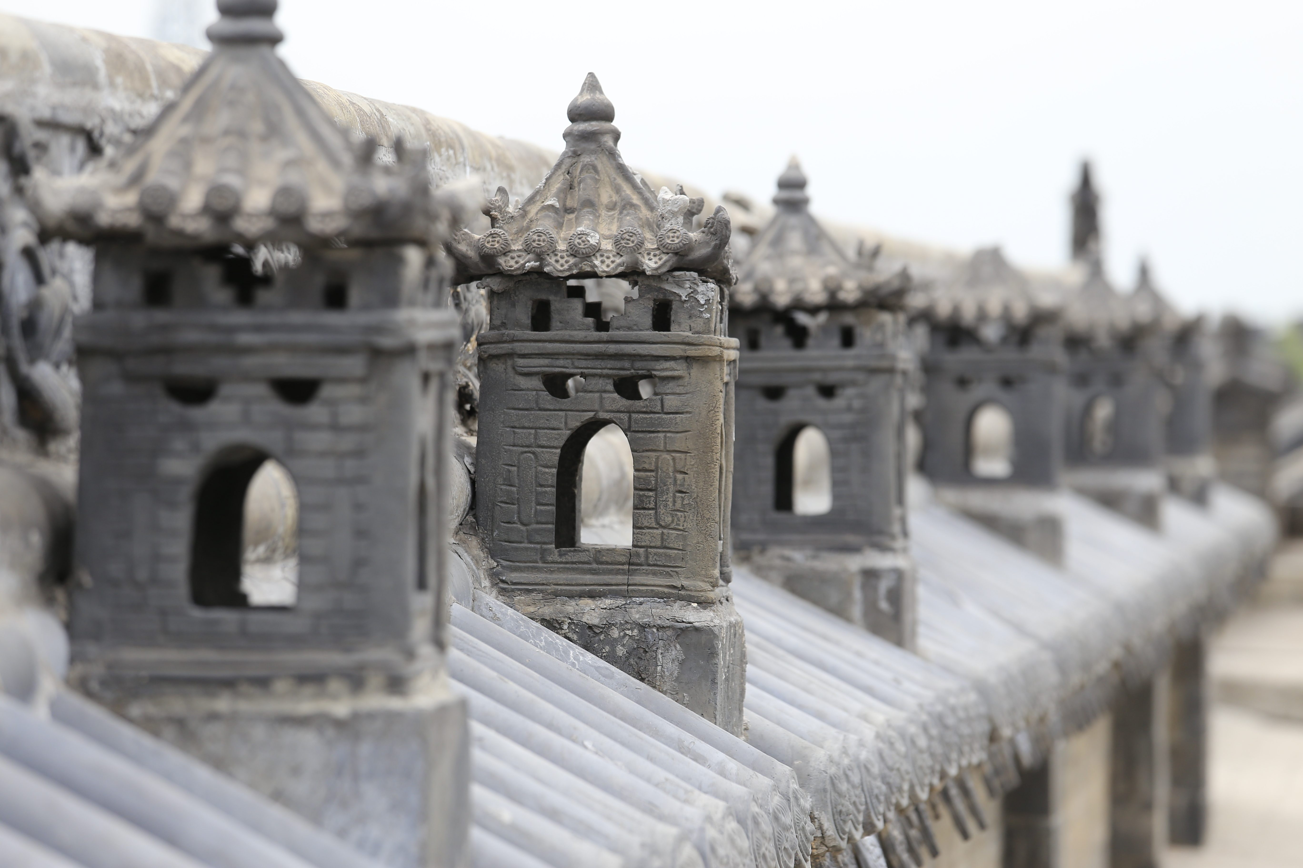 灵石静升王家大院 —— 西院（红门堡）